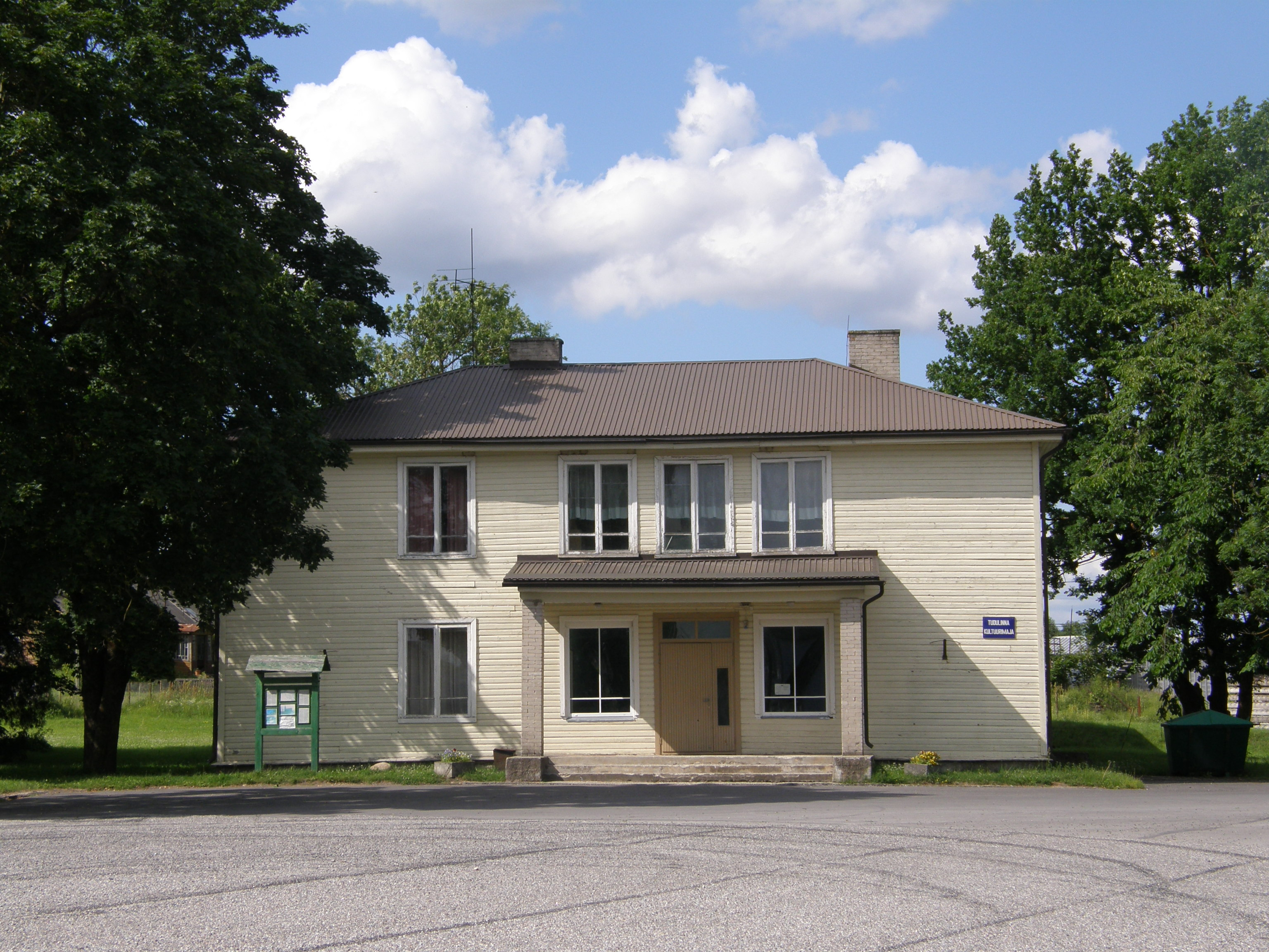 Tudulinna kultuurimaja